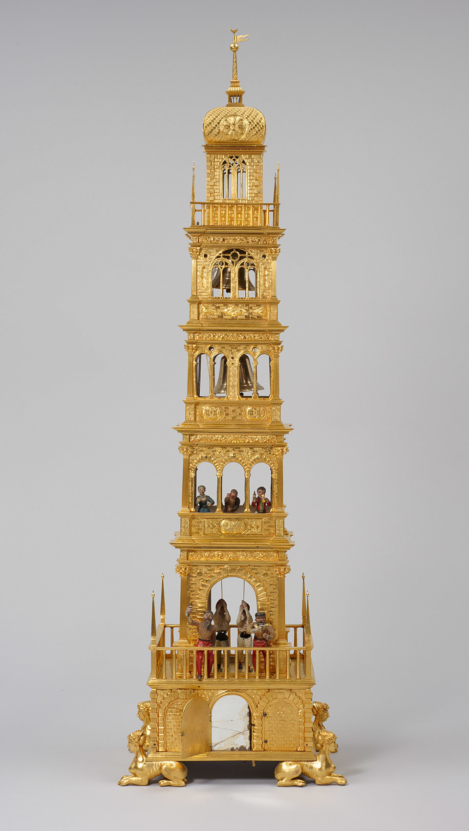 Automate tour clocher